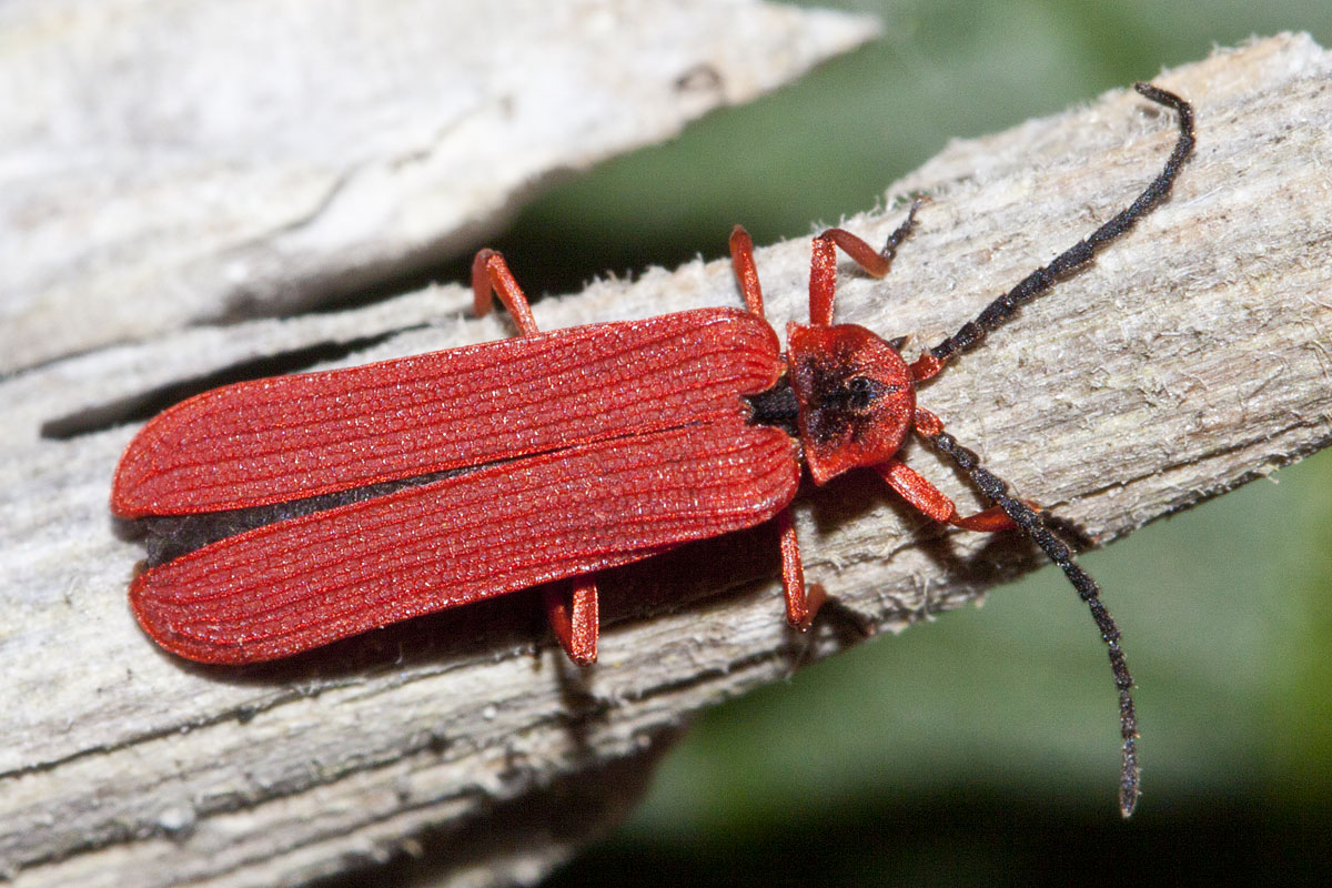 Cambria, San Luis Obispo Co., CA, USA.